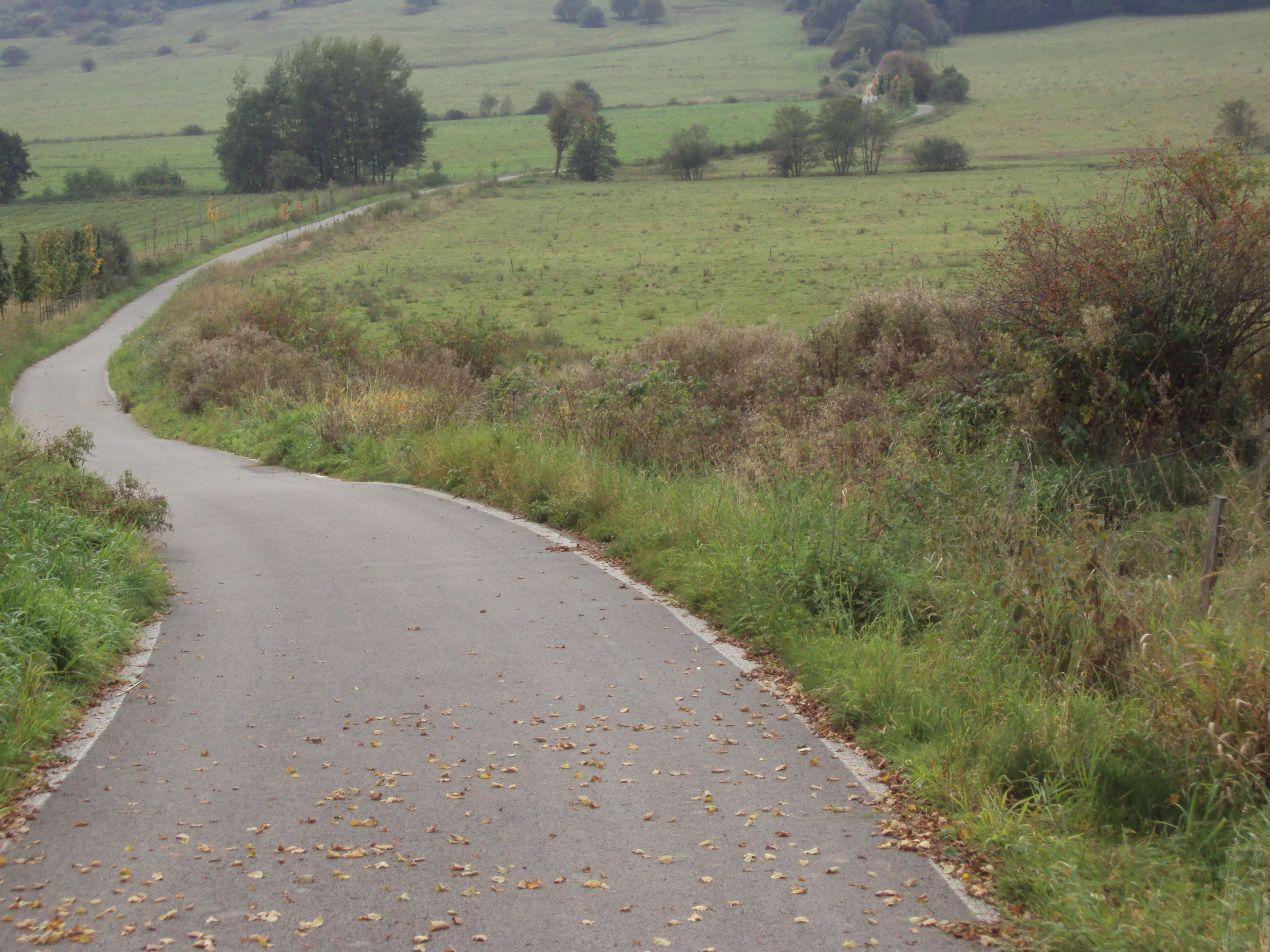 Cyklostezka mezi Českou Lípou a obcí Písečná